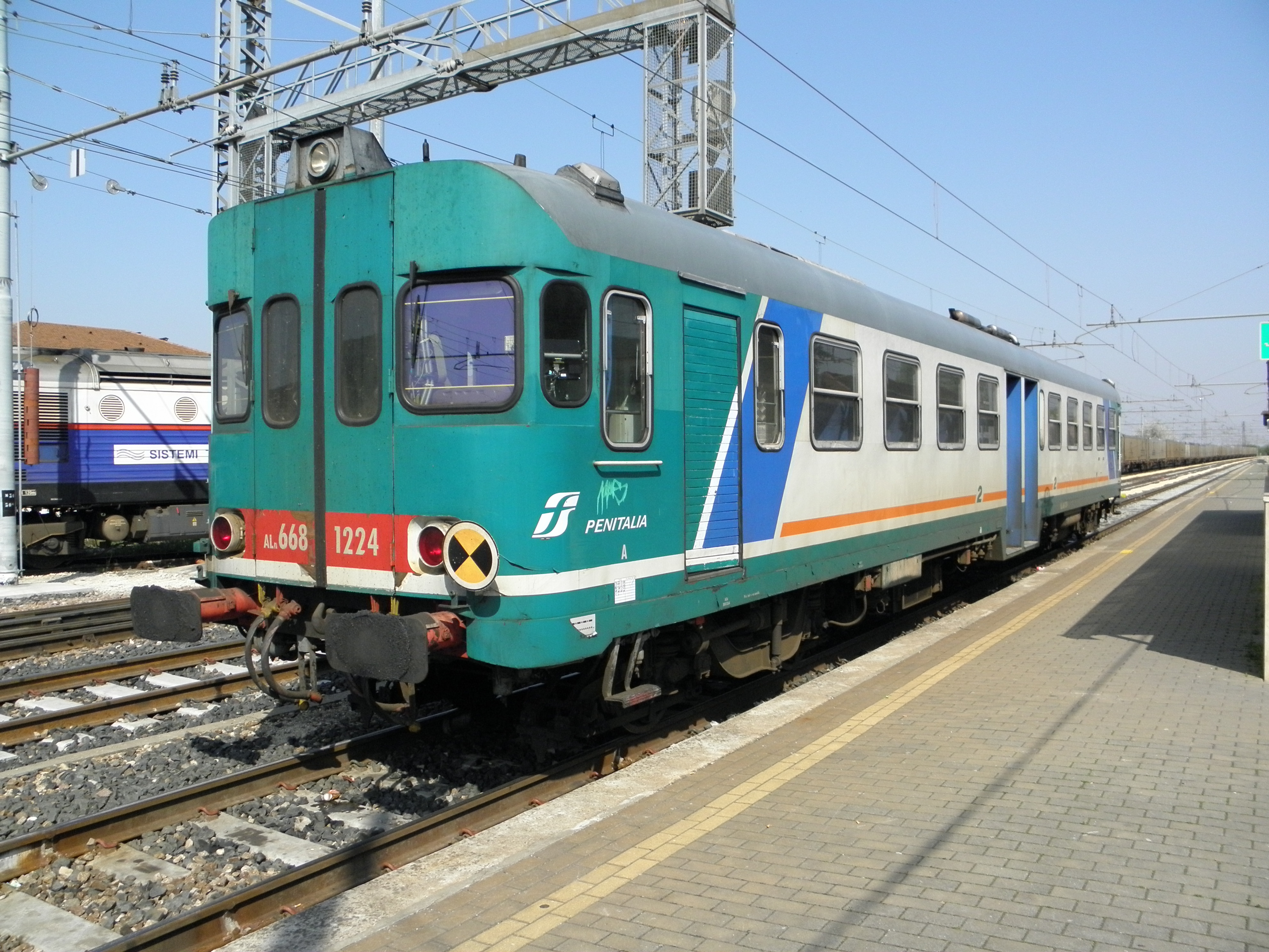 L'automotrice FS ALn 668.1224 in sosta sul binario 5 della stazione ferroviaria di Rovigo.